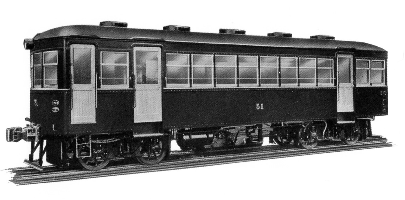 三河鉄道キ50形 蒲郡線開業用で芸備キハニ14と同形